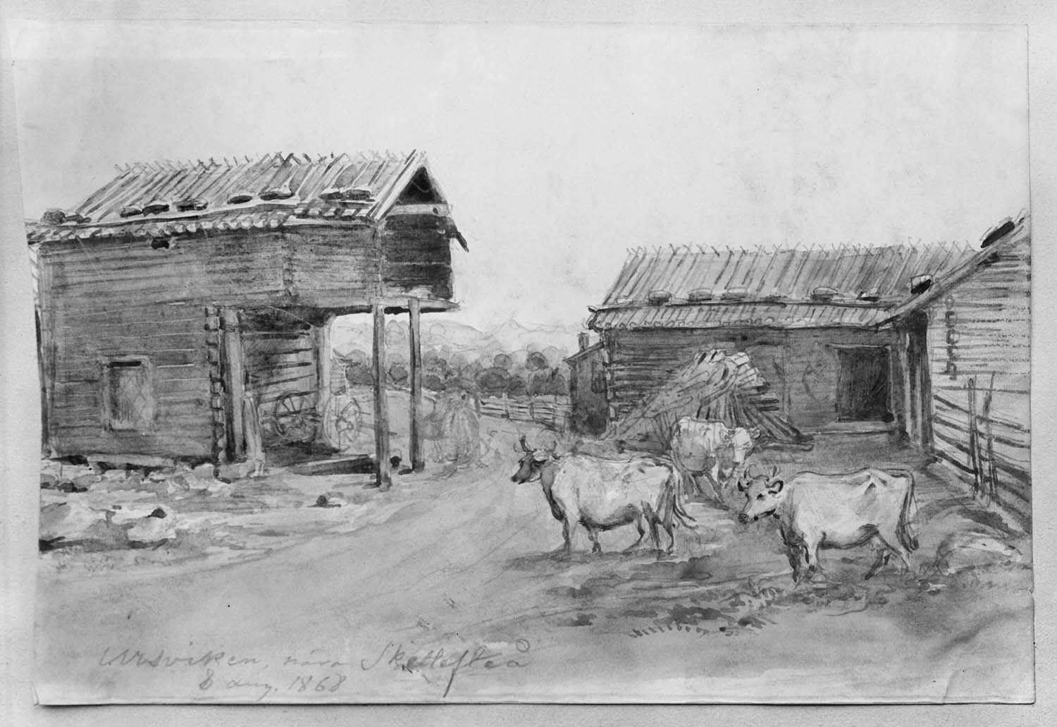 depicted place: Västerbotten, Skellefteå, Skellefteå socken, Ursviken (Sverige (SE))